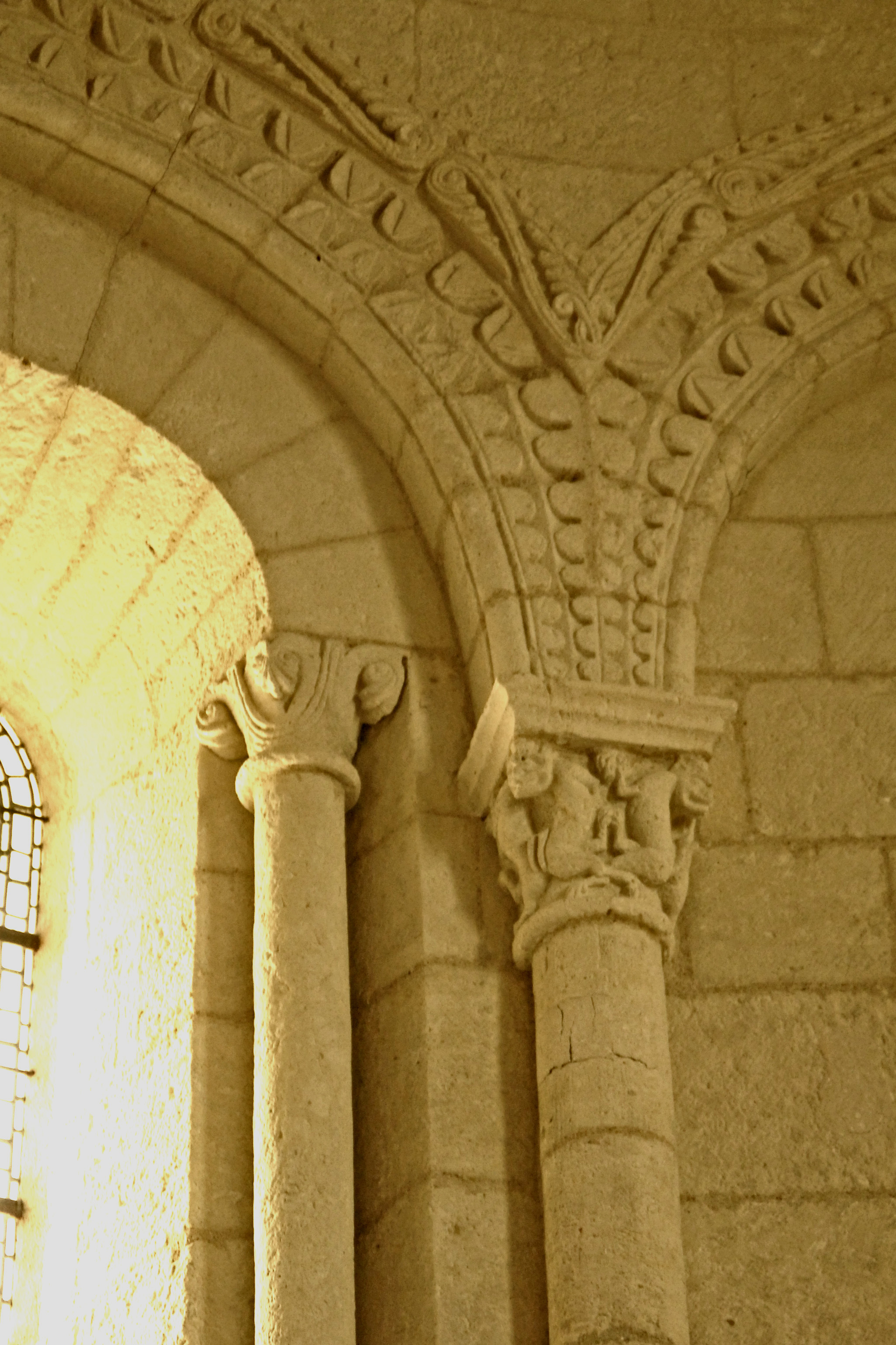 Sainte-Radegonde-Talmont-sur-Gironde, Arkadenkapitelle im Chor